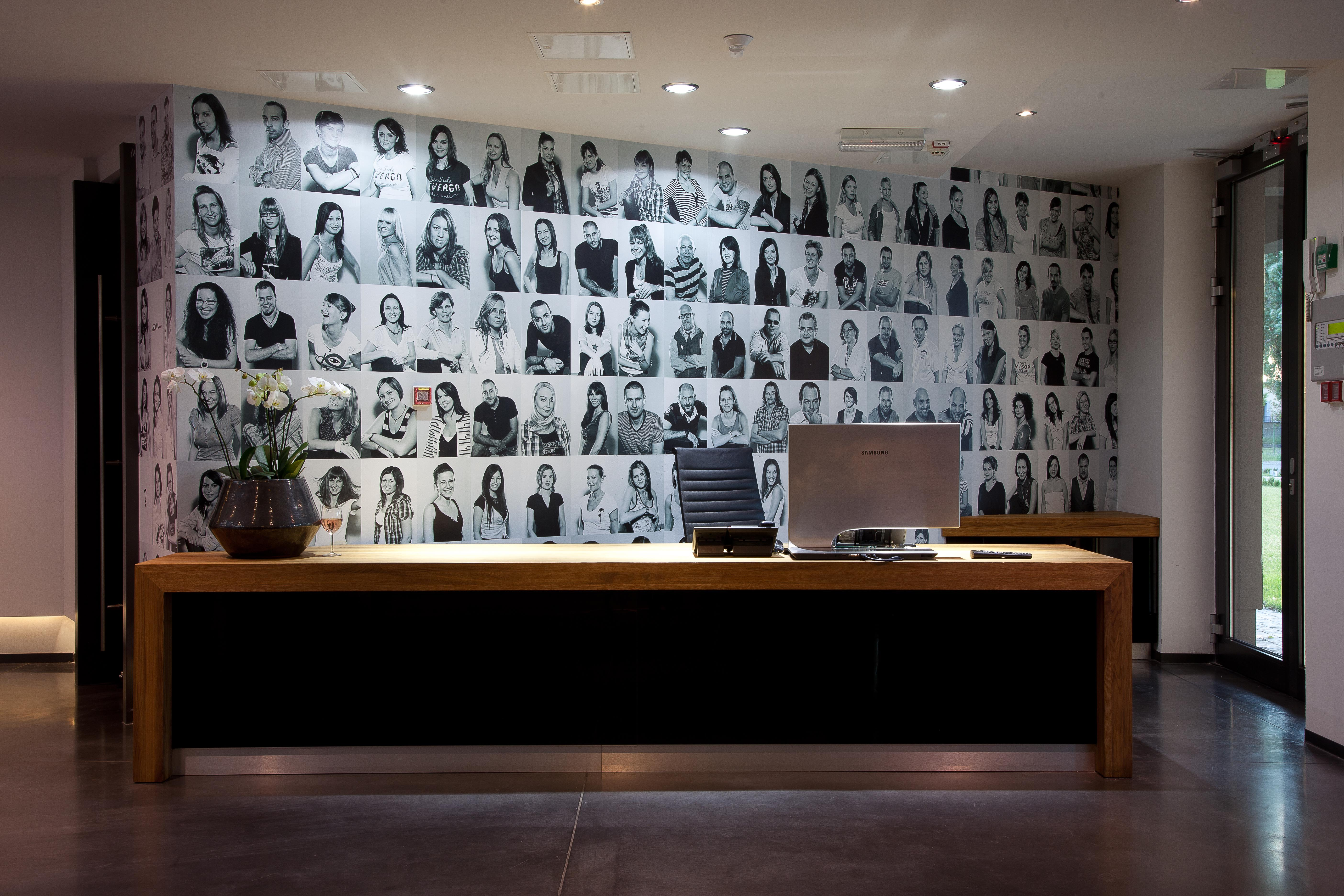 Munkatársaink kép art, a központ bejáratánál.